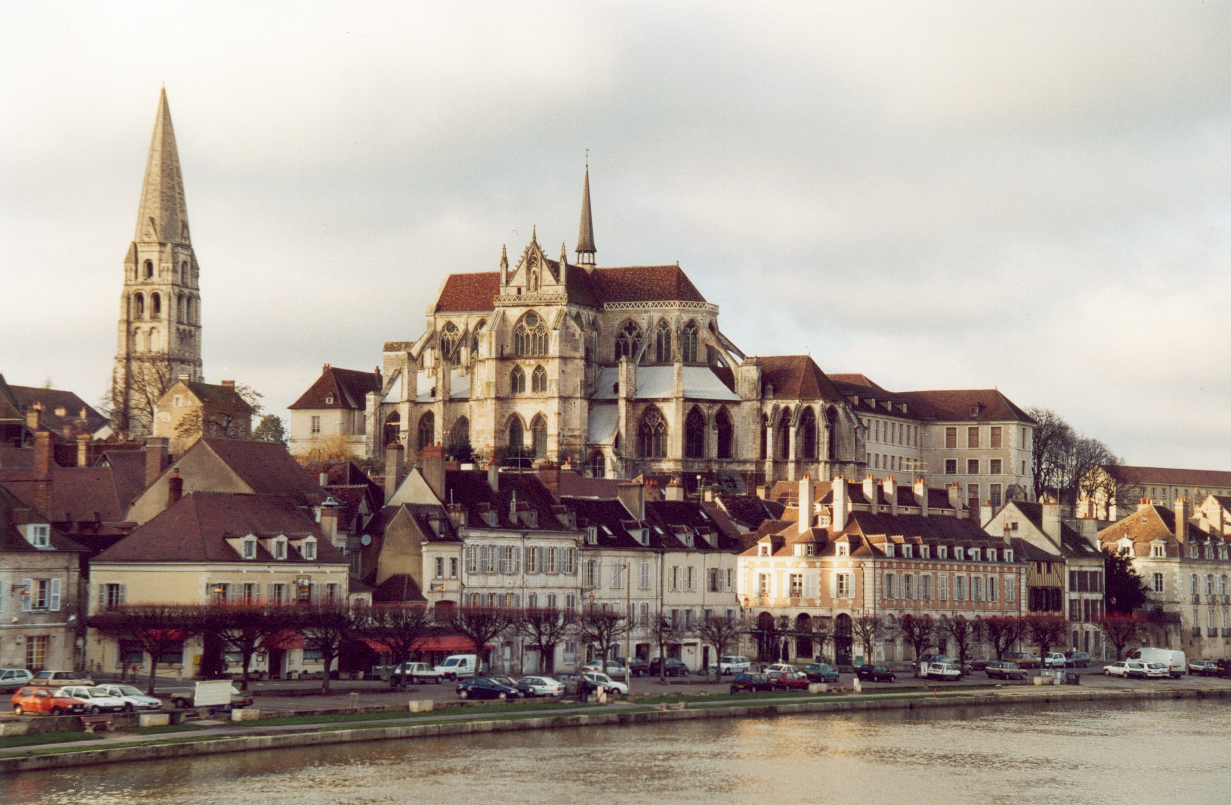 France Yonne Auxerre Photographie prise par GIRAUD Patrick